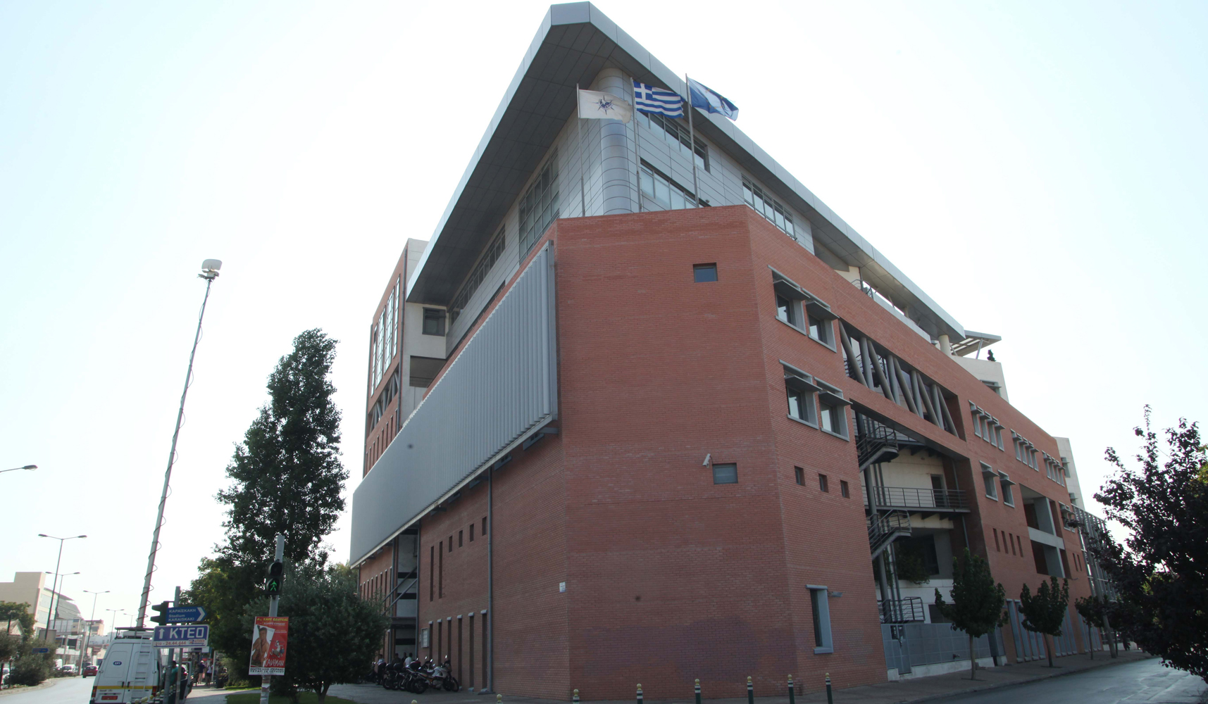 ELSTAT building